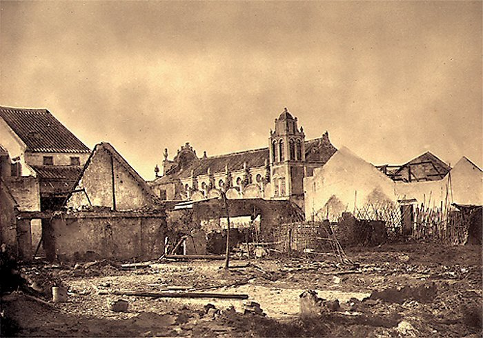 Nhà thờ thuộc Hội thừa sai Paris, xây dựng tại thành phố Nam Định thời Pháp thuộc.